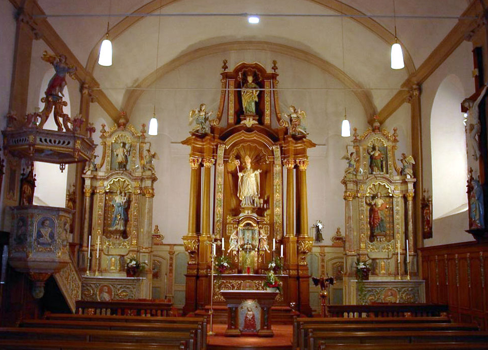 Kierch Pënsch banne riicht